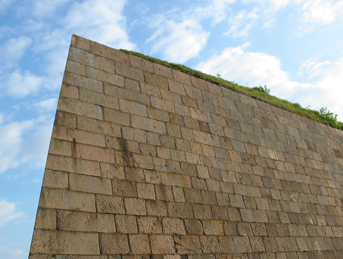 Nrf: Fort Régent, Saint Hélyi, Jèrri